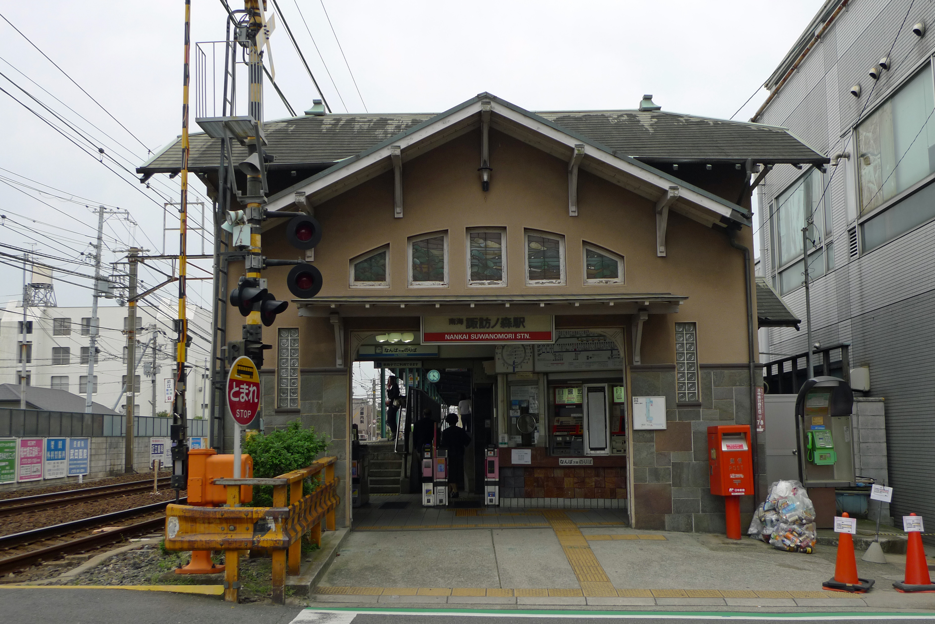 南海本線諏訪ノ森駅難波方面駅舎